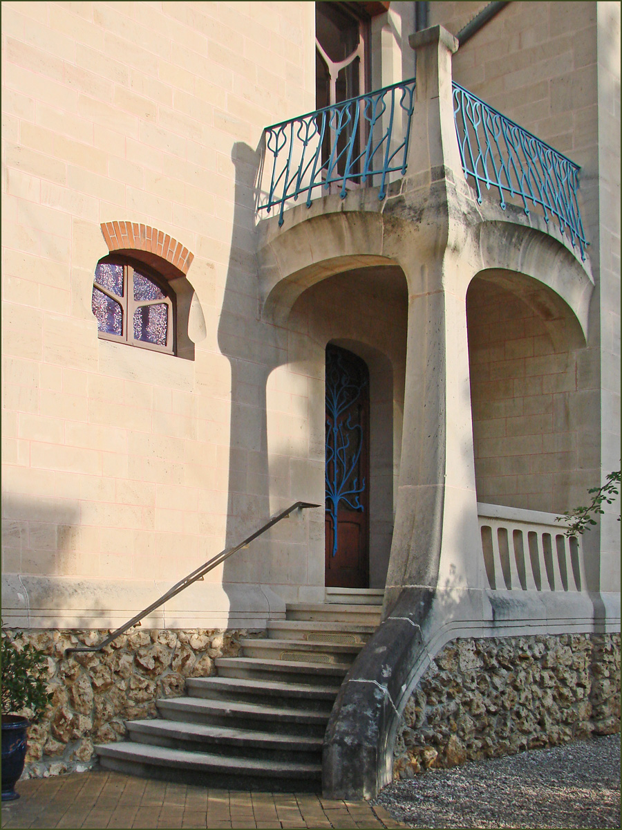 Entrée de la villa Les Glycines du négociant Charles Fernbach, construite en 1902-1903 dans le parc de Saurupt à Nancy par l'architecte Émile André (1871-1923) de l'École de Nancy.